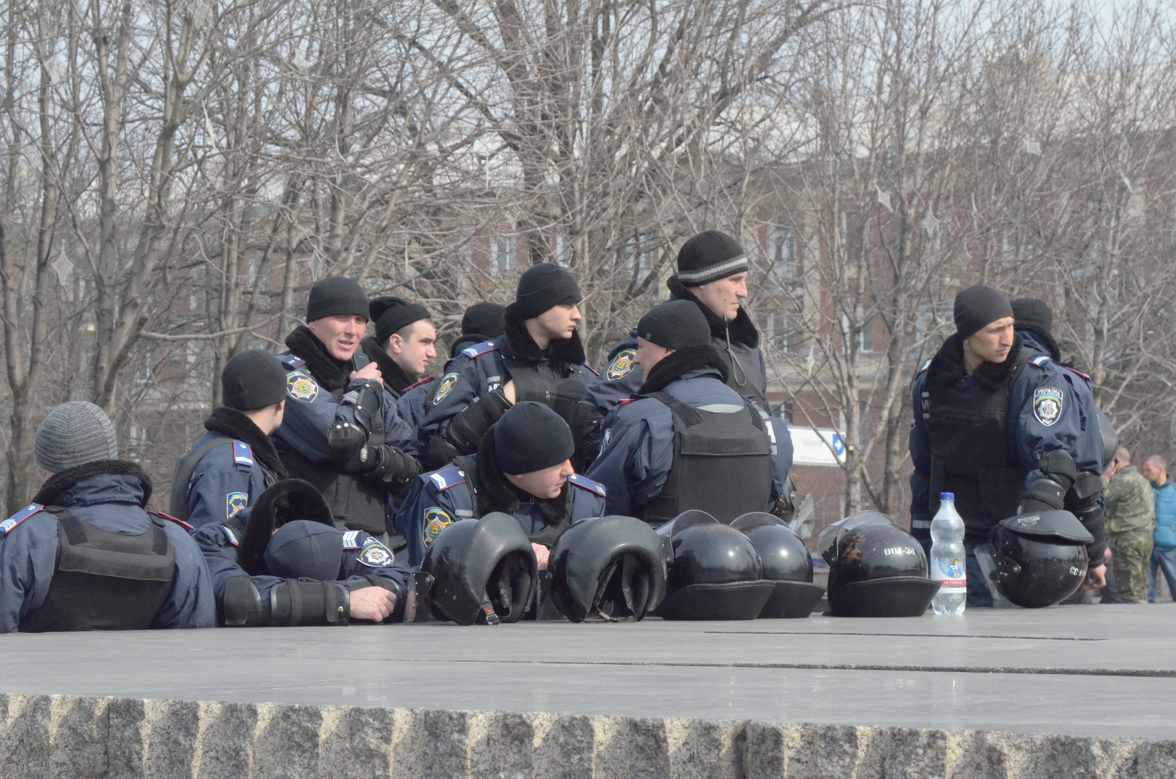 Протесты в Донецке